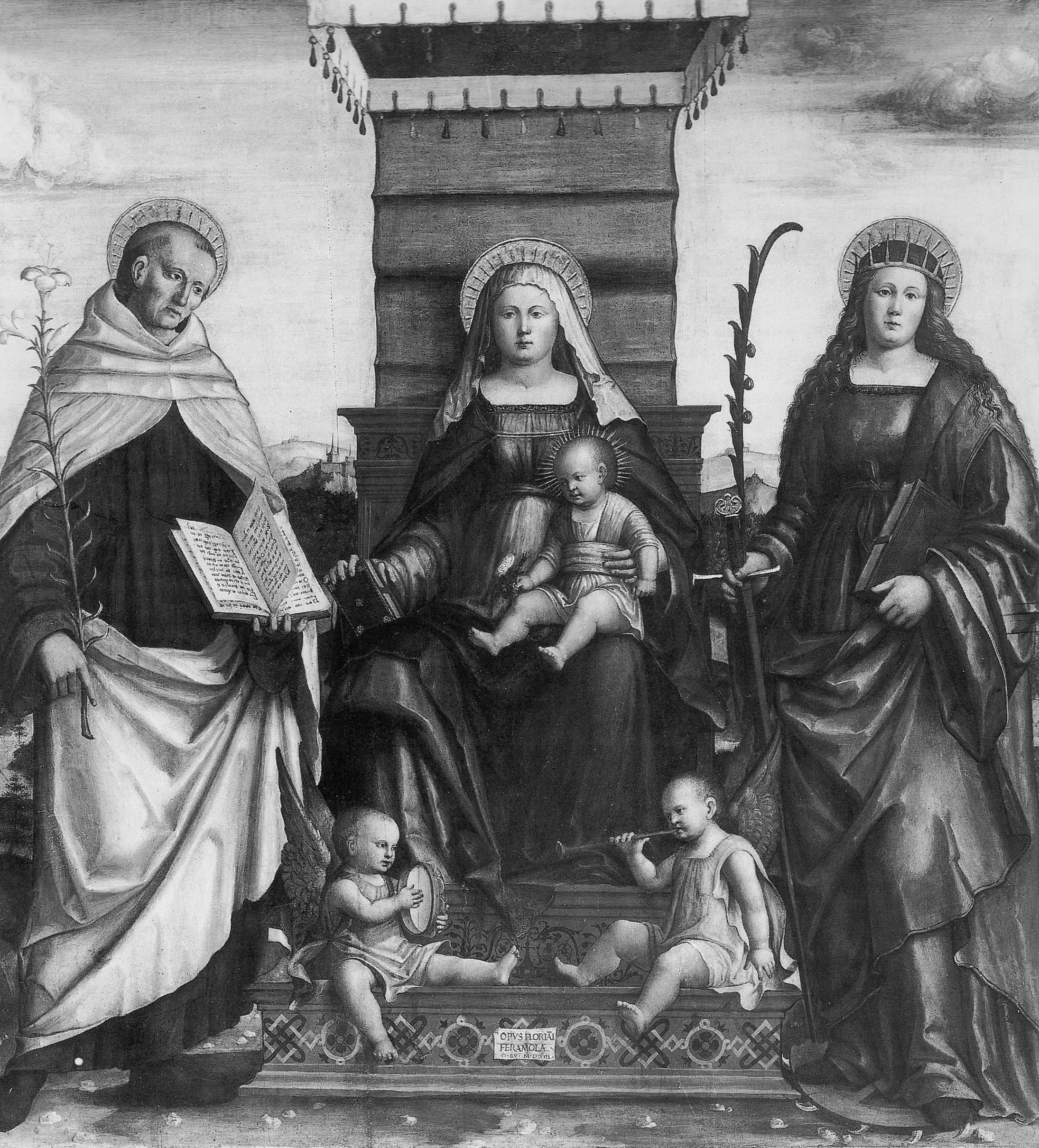 Madonna col Bambino tra i santi Alberto Carmelitano e Caterina d'Alessandria (Floriano Ferramola, 1515, Bode-Museum, Berlino)